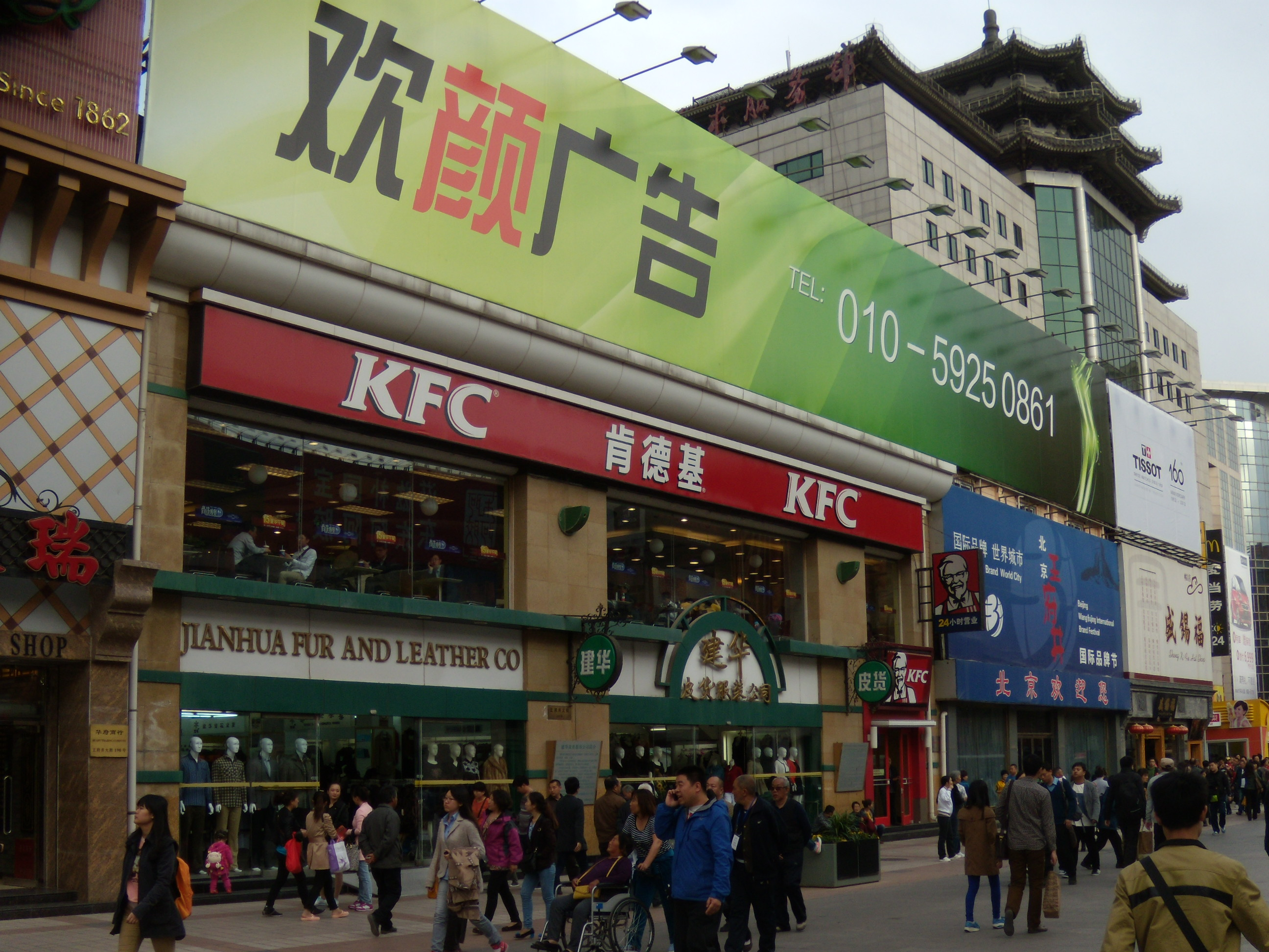 建华皮货服装公司，位于王府井大街